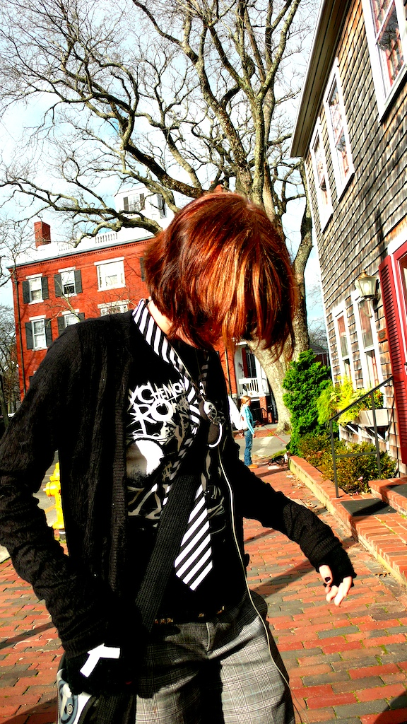 Emo Girl